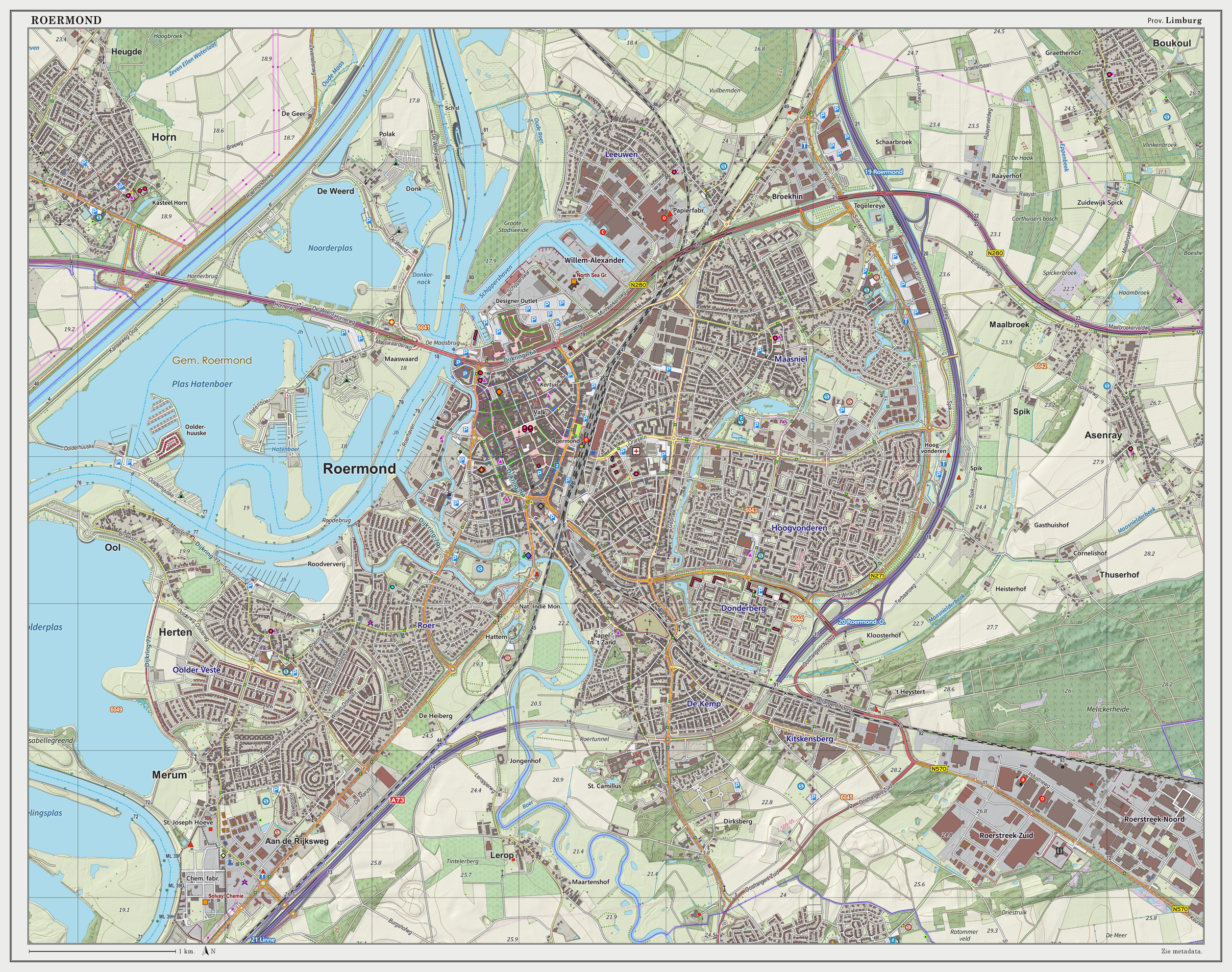 Topografische kaart van Roermond (woonplaats). Resolutie: 300 pixels/km. Kaartbeeld samengesteld uit de open geodata van de Top10NL en Top25namen (Basisregistratie Topografie, Kadaster), Creative Commons BY licentie. Gebouwvlakken uit open geodata BAG extract. Wegen uit de OpenStreetMap. Reliëfschaduw uit de Actuele Hoogtekaart AHN2. Samenstelling en kleurenschema: Jan-Willem van Aalst, met QGIS2. Zie ook de Legenda.